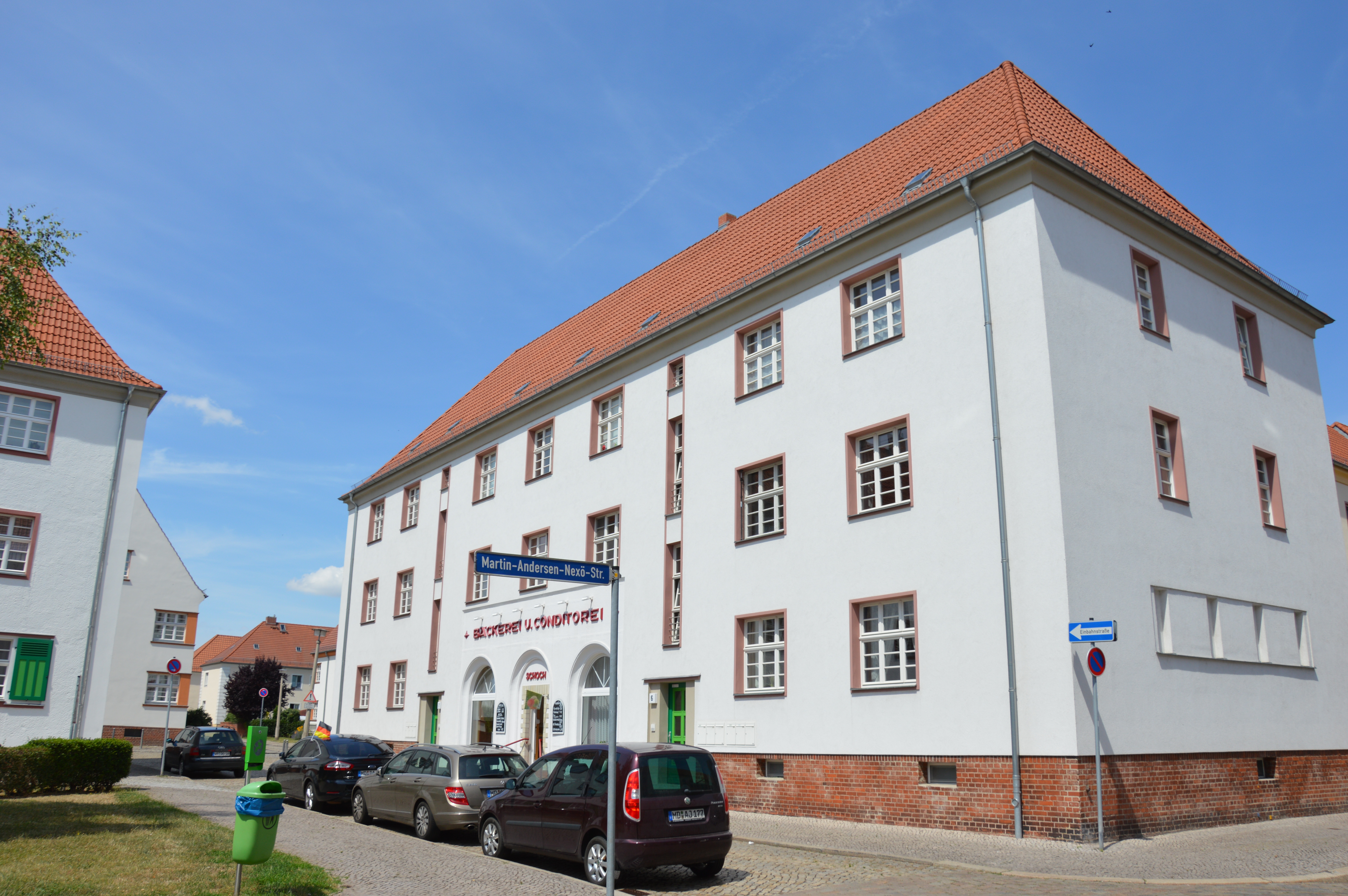 Siedlung Westernplan